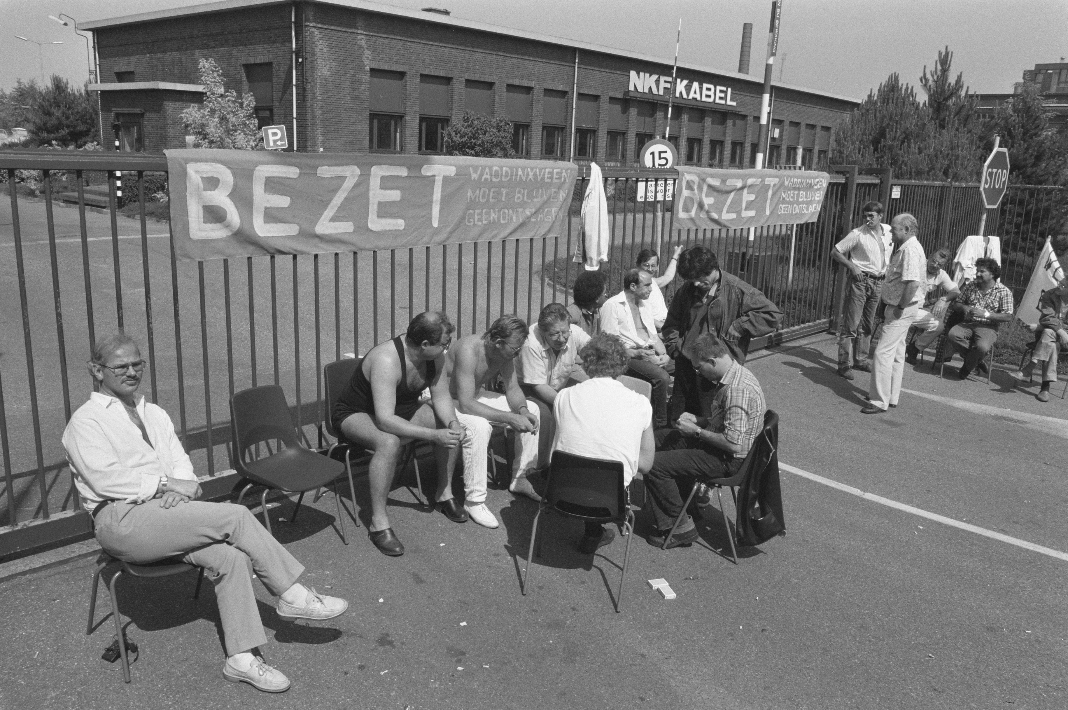 Collectie / Archief : Fotocollectie Anefo Reportage / Serie : [ onbekend ] Beschrijving : Kabelfabriek NKF te Waddinxveen bezet , De kabelfabriek was gevestigd in de voormalige tabaksfabriek van Louis Dobbelmann Datum : 12 juni 1989 Locatie : Waddinxveen, Zuid-Holland Trefwoorden : bezettingen, fabrieken, leuzen, spandoeken Fotograaf : Bogaerts, Rob / Anefo Auteursrechthebbende : Nationaal Archief Materiaalsoort : Negatief (zwart/wit) Nummer archiefinventaris : bekijk toegang 2.24.01.05 Bestanddeelnummer : 934-4685